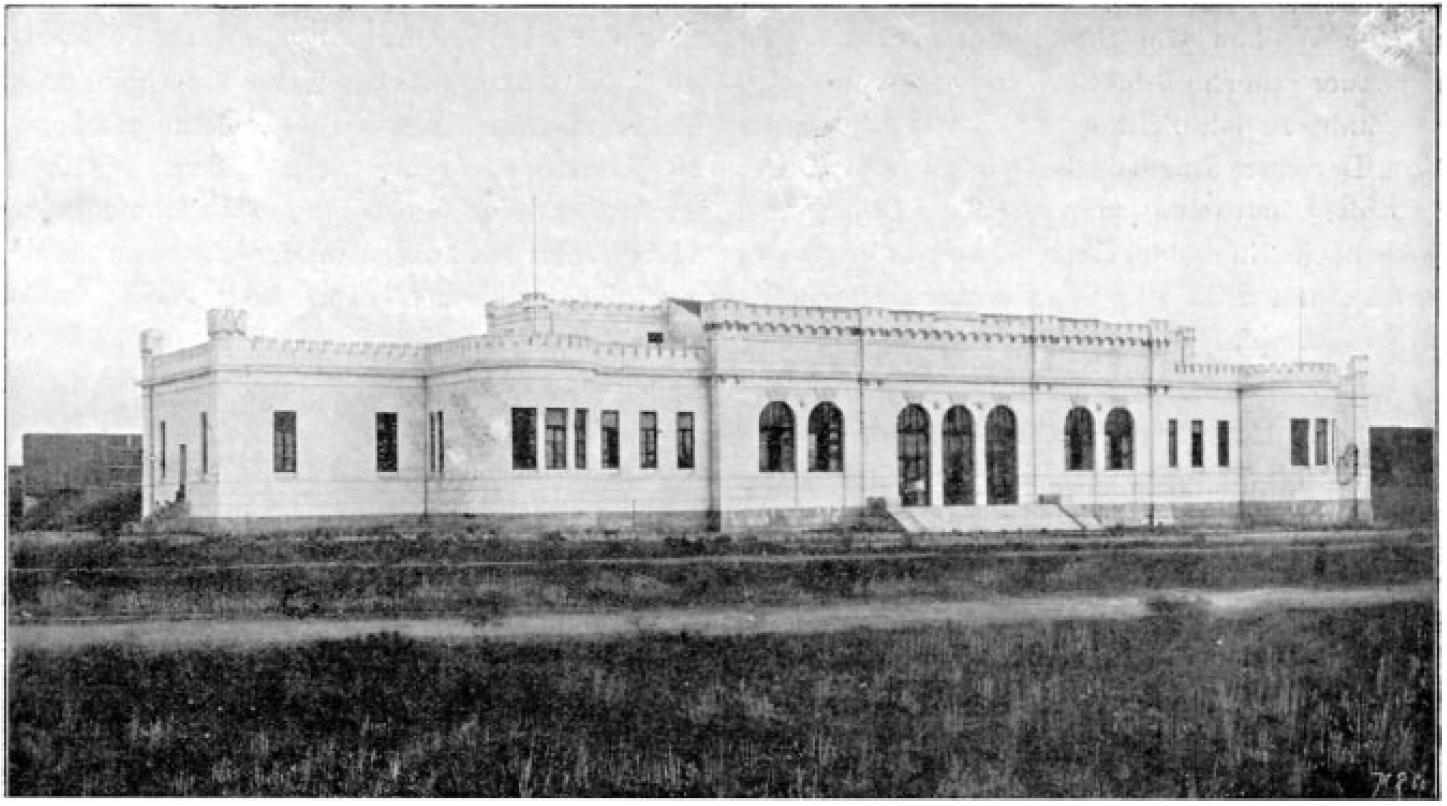 Das neue Schiesshaus, Olympische Spiele 1896